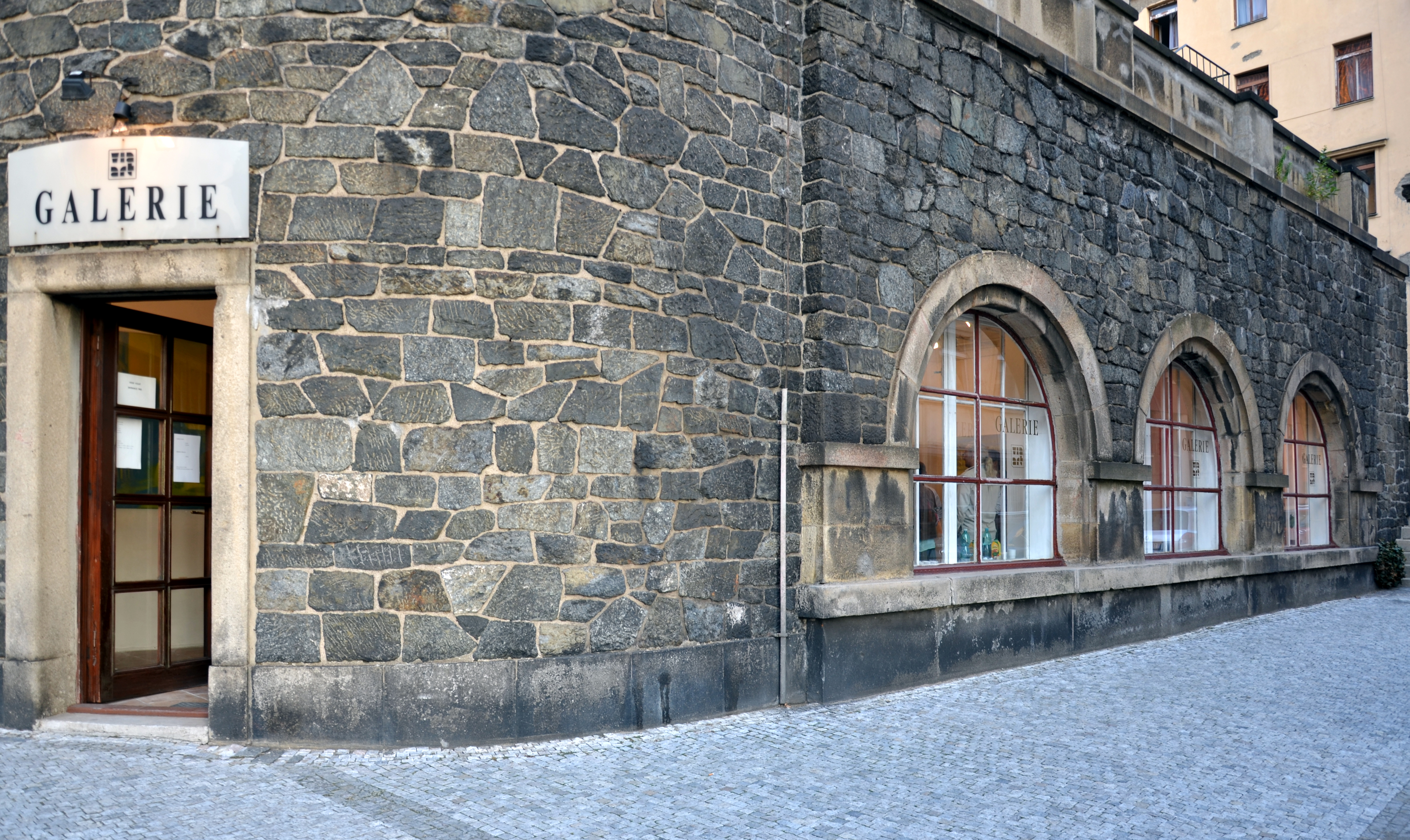 Galerie Via Art, Resslova 6, Praha 2